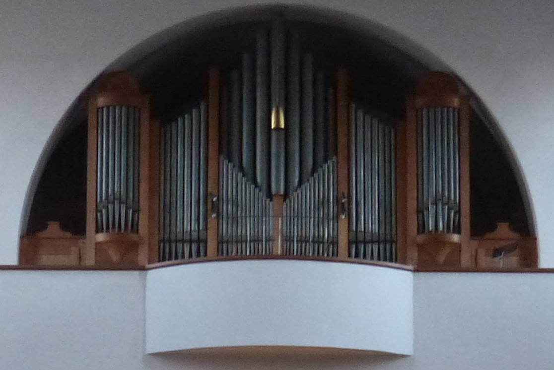 Kirche Heiligste Dreifaltigkeit (Augsburg-Kriegshaber), Blick vom Chor zur Empore.